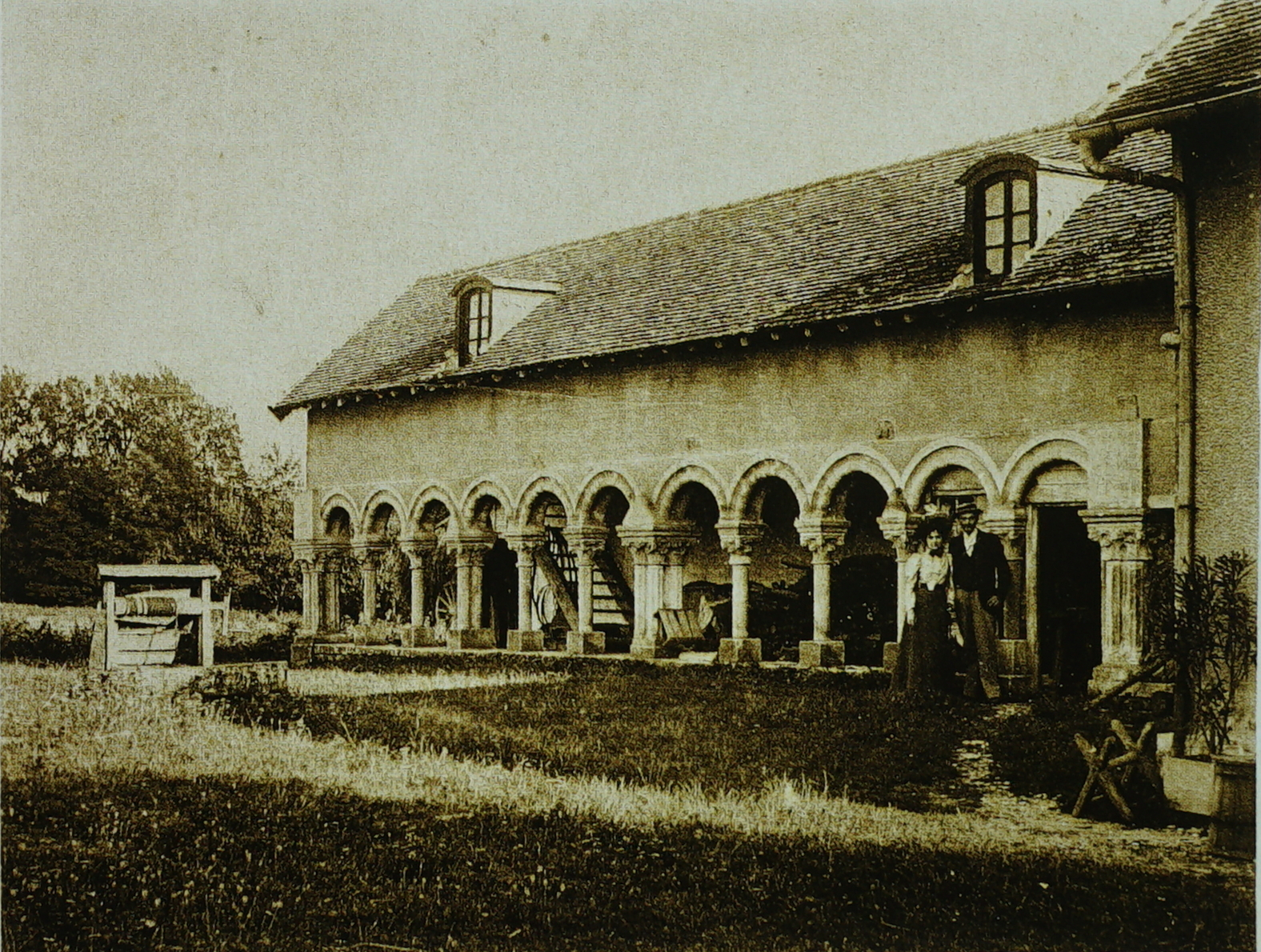 restes de l'abbaye de bassefontaine